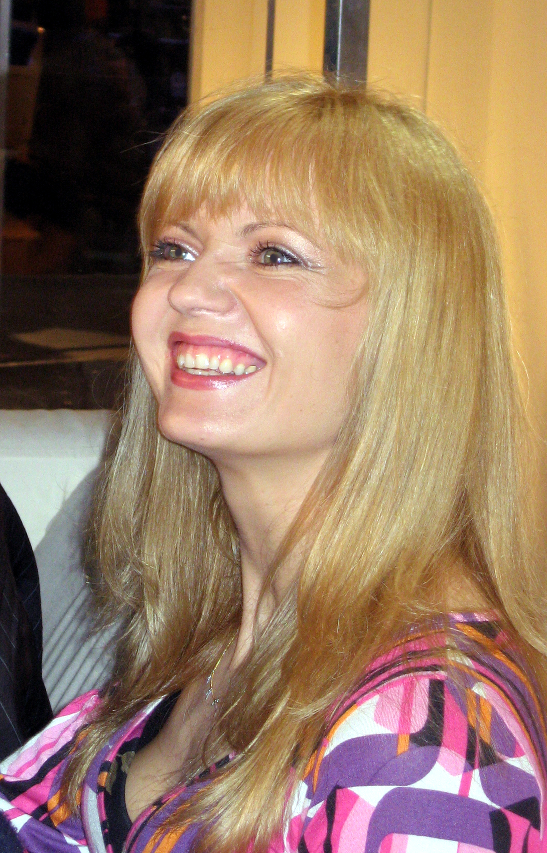 Olga Borys na dniu Otwartym TVP (9 września 2007)